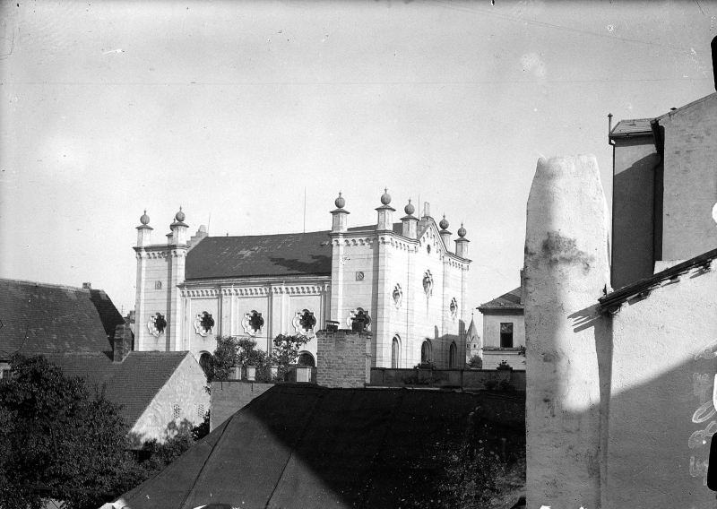 Synagoga v Jihlavě